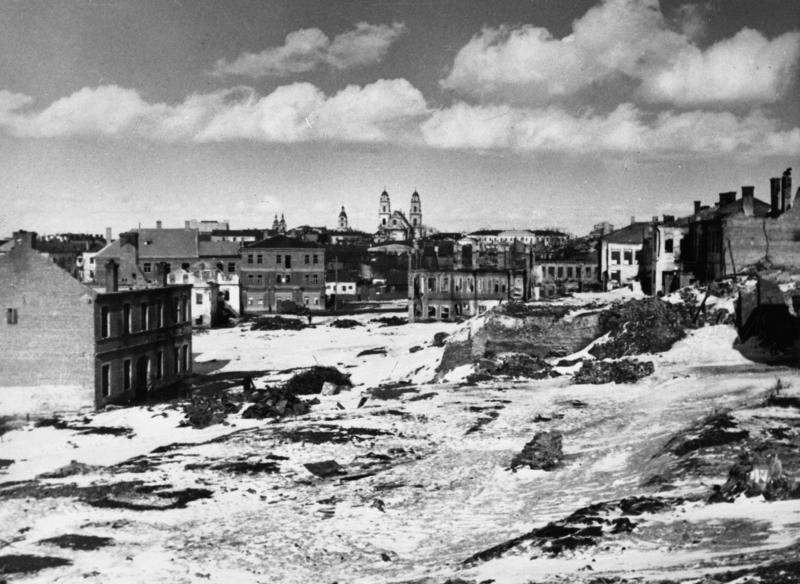 Weißrussland, Minsk, Zerstörungen Sowjetunion, Minsk.- Zertörungen. Information added by Wikimedia users.Беларуская (тарашкевіца): Разбурэньні ў Менску. Беларусь. 1941 год.